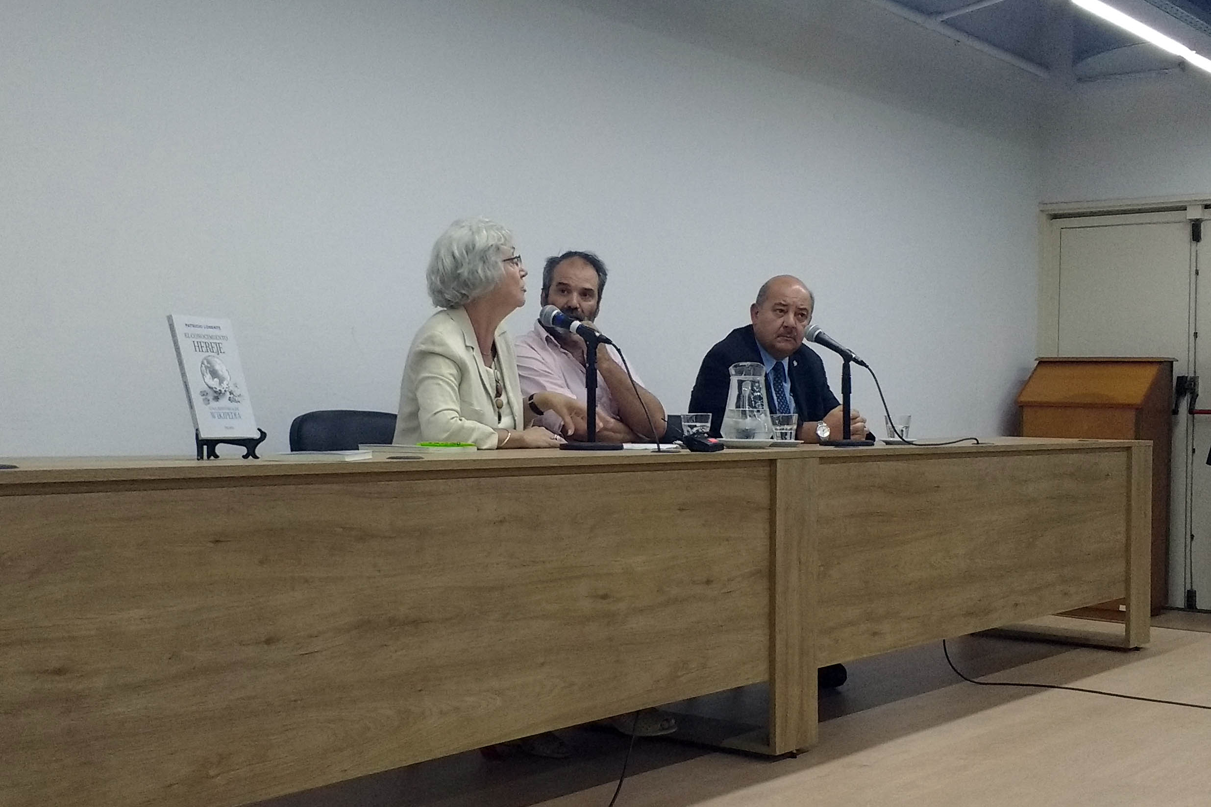 Presentación del libro "El conocimiento hereje: una historia de Wikipedia", de Patricio Lorente, en el Edificio Sergio Karakachoff.